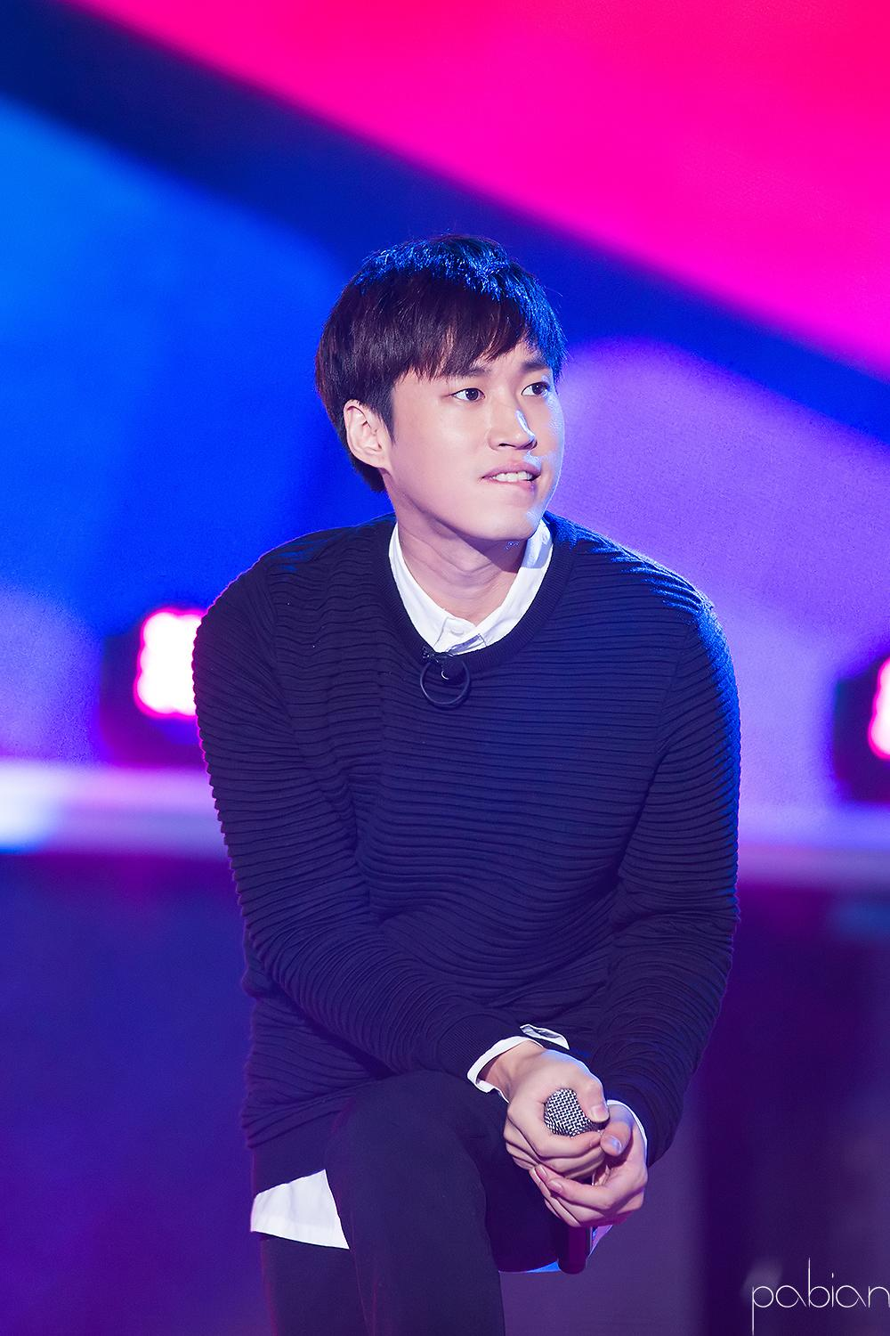 140904 크게 라디오를 켜고